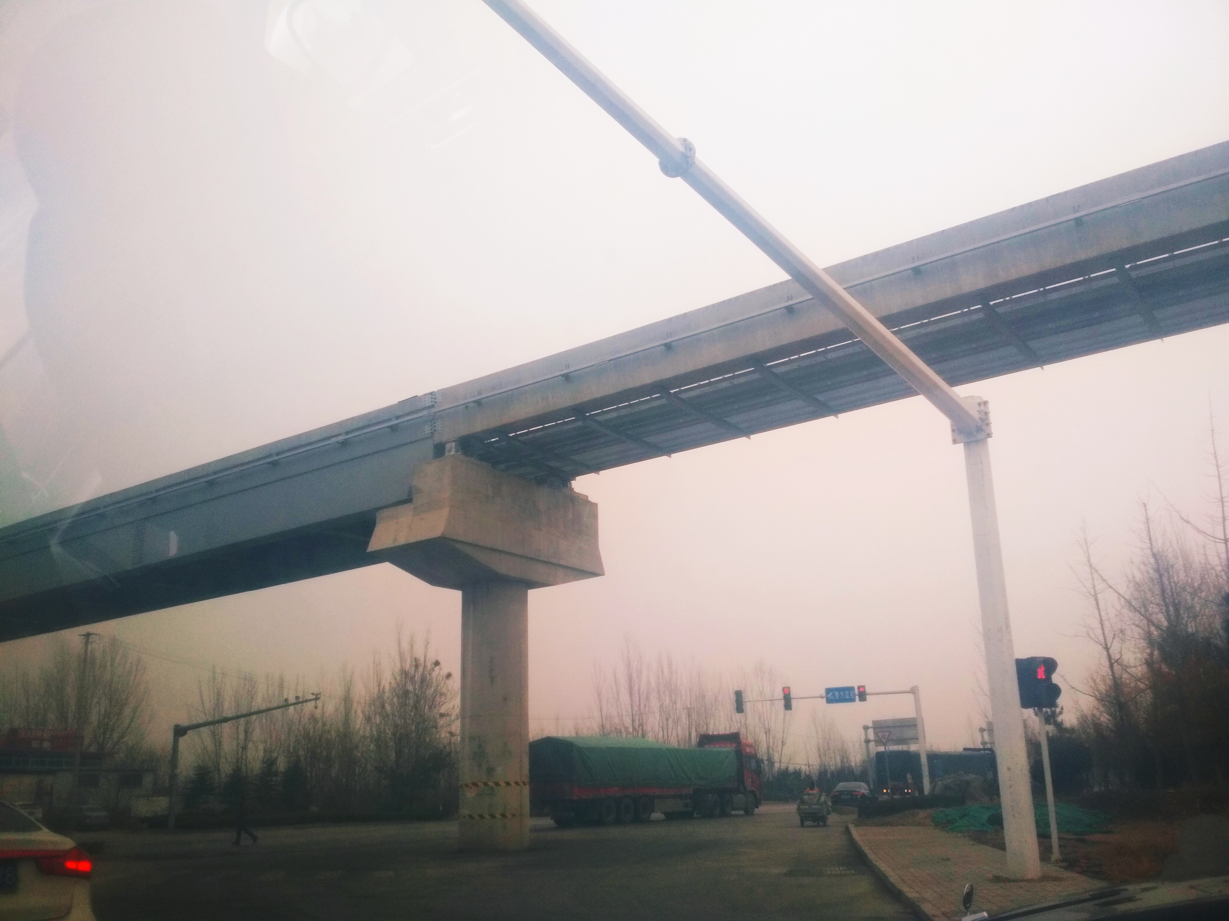 中文（中国大陆）: 云轨（中国山东省曲阜市附近）